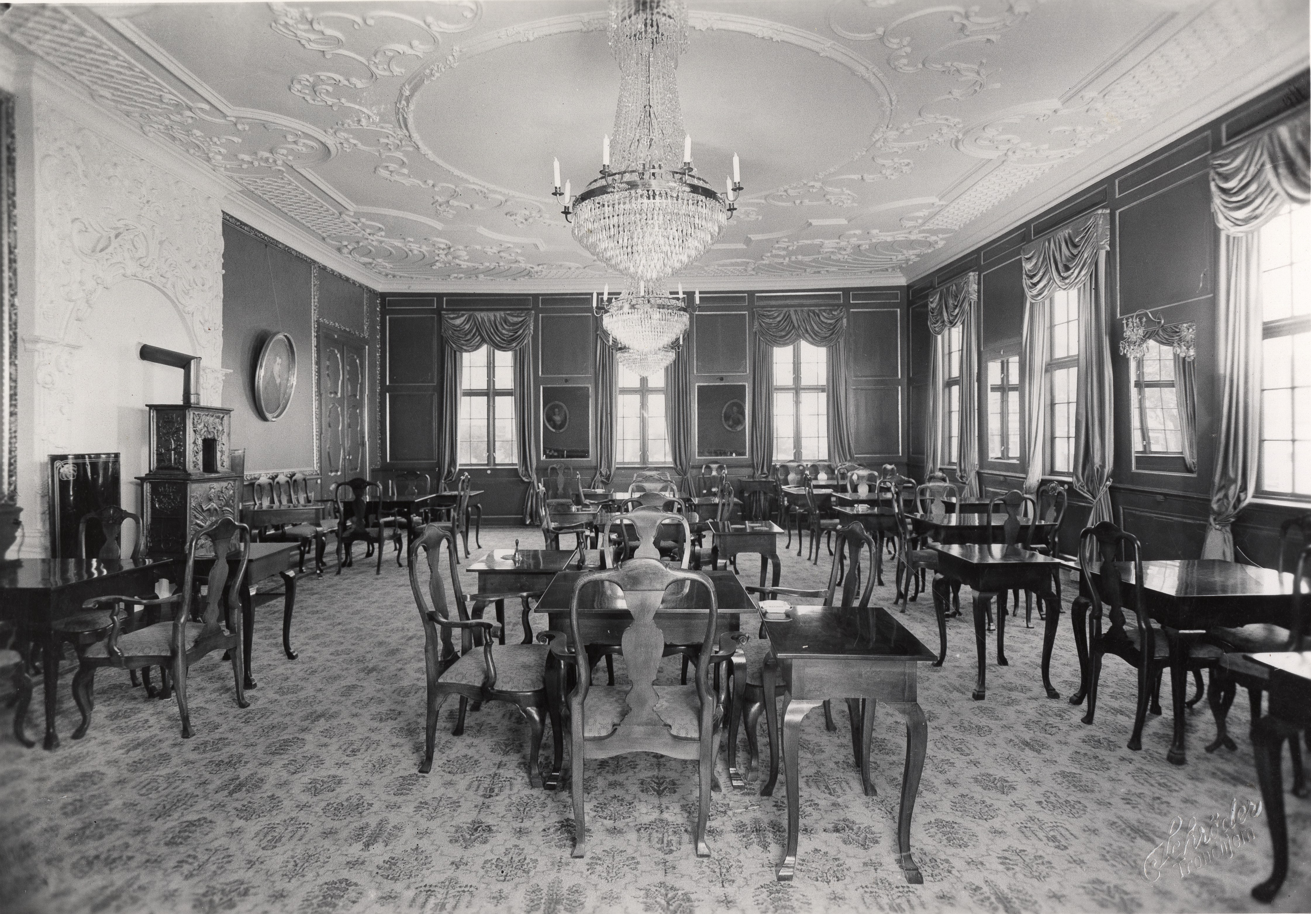 "Børssalen" i Mølmanns trepalé, senere kalt "Harmonien", da Klubselskabet Harmonien overtok huset i 1825. Salen ble omfattende restaurert i 1939 under ledelse av Domenico Erdmann